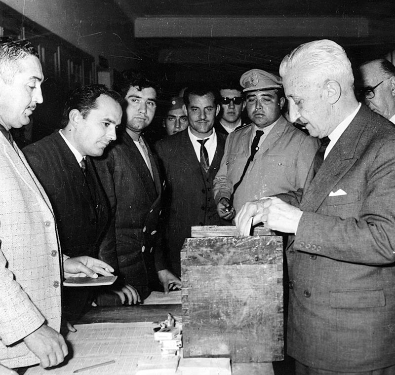 Arturo Illia votando en 1963